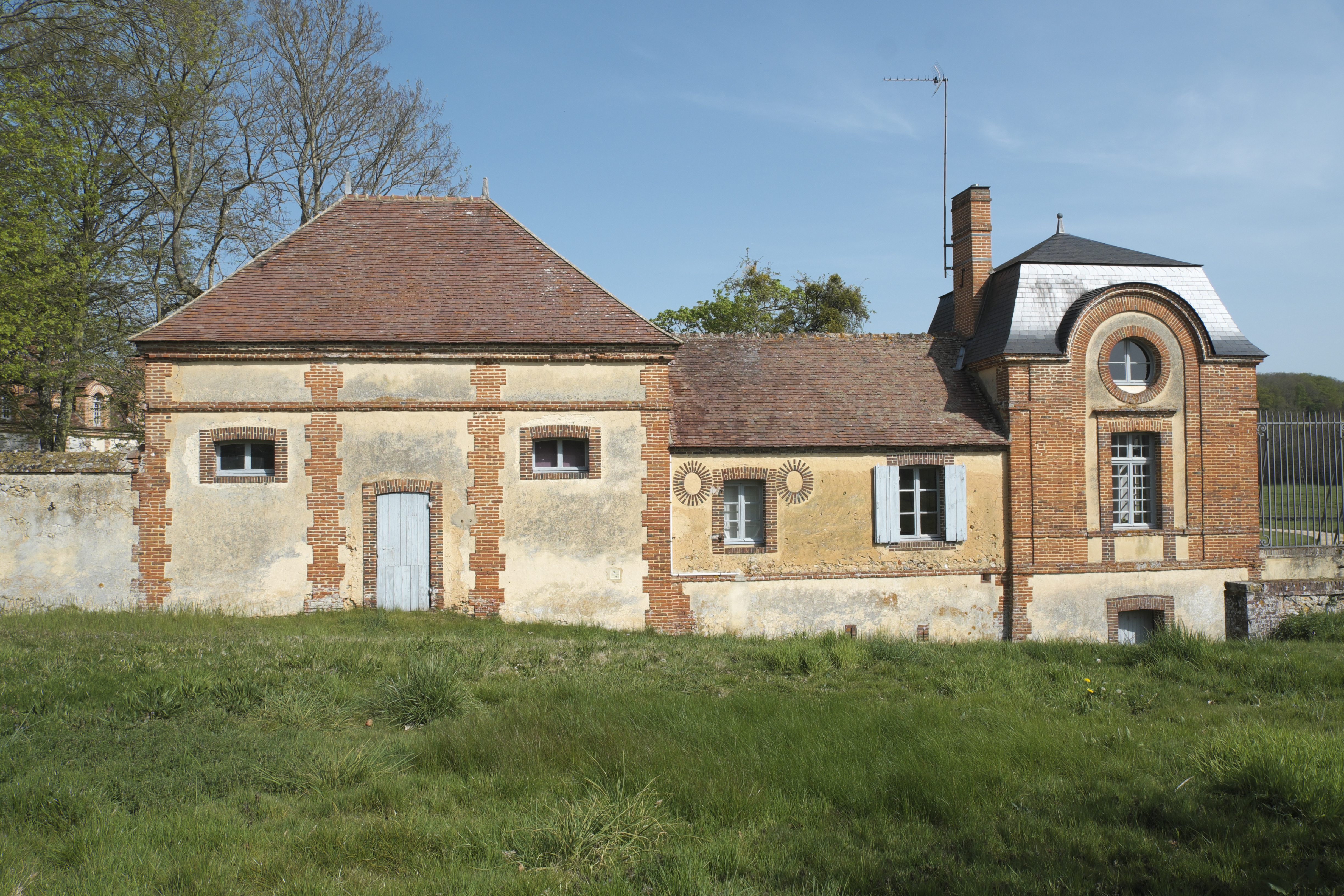 Schlosss (Château) in Montigny-sur-Avre im Département Eure-et-Loir (Region Centre-Val de Loire/Frankreich)